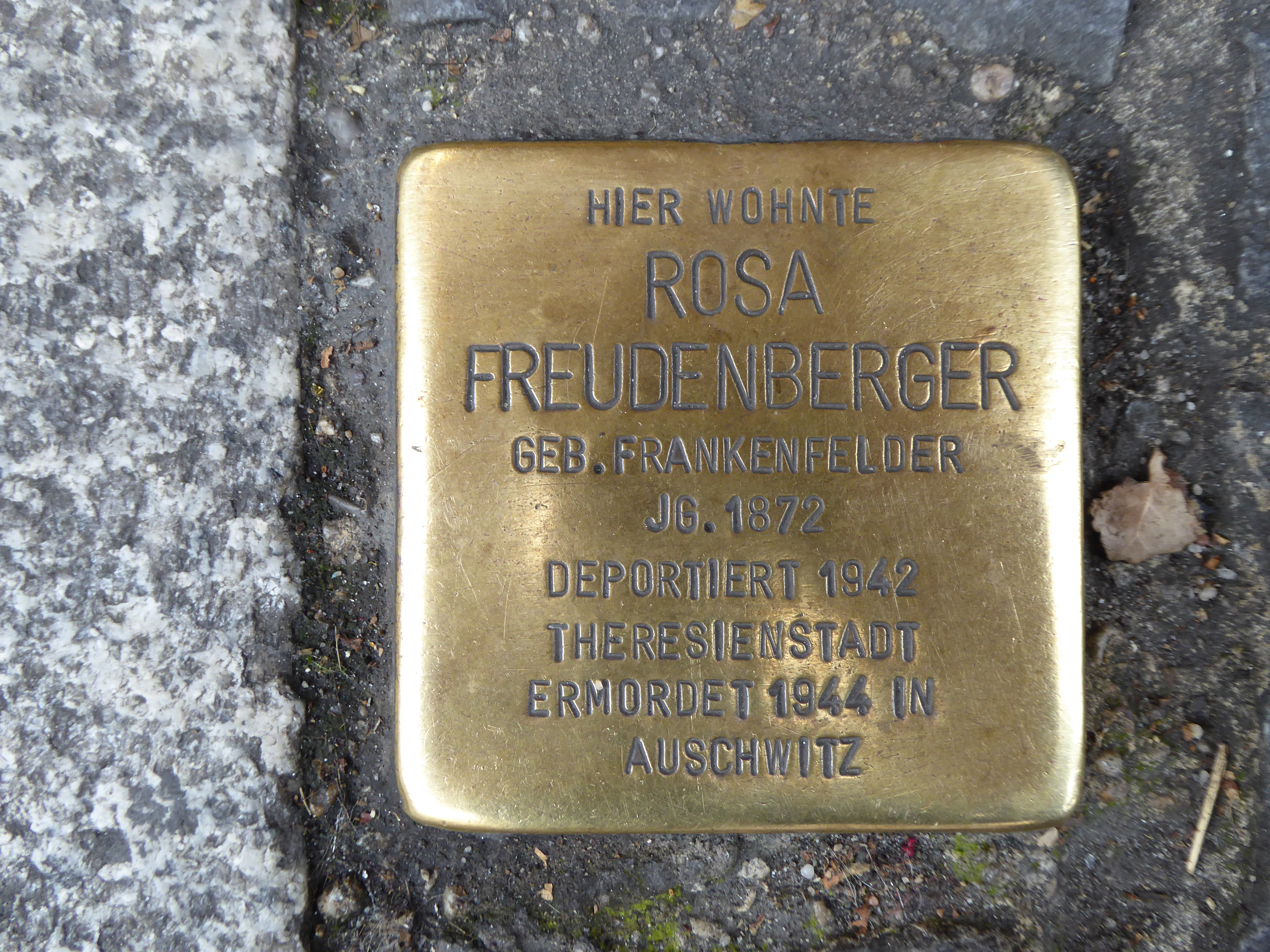 Stolperstein in Würzburg in der Augustinerstraße 4 für Rosa Freudenberg